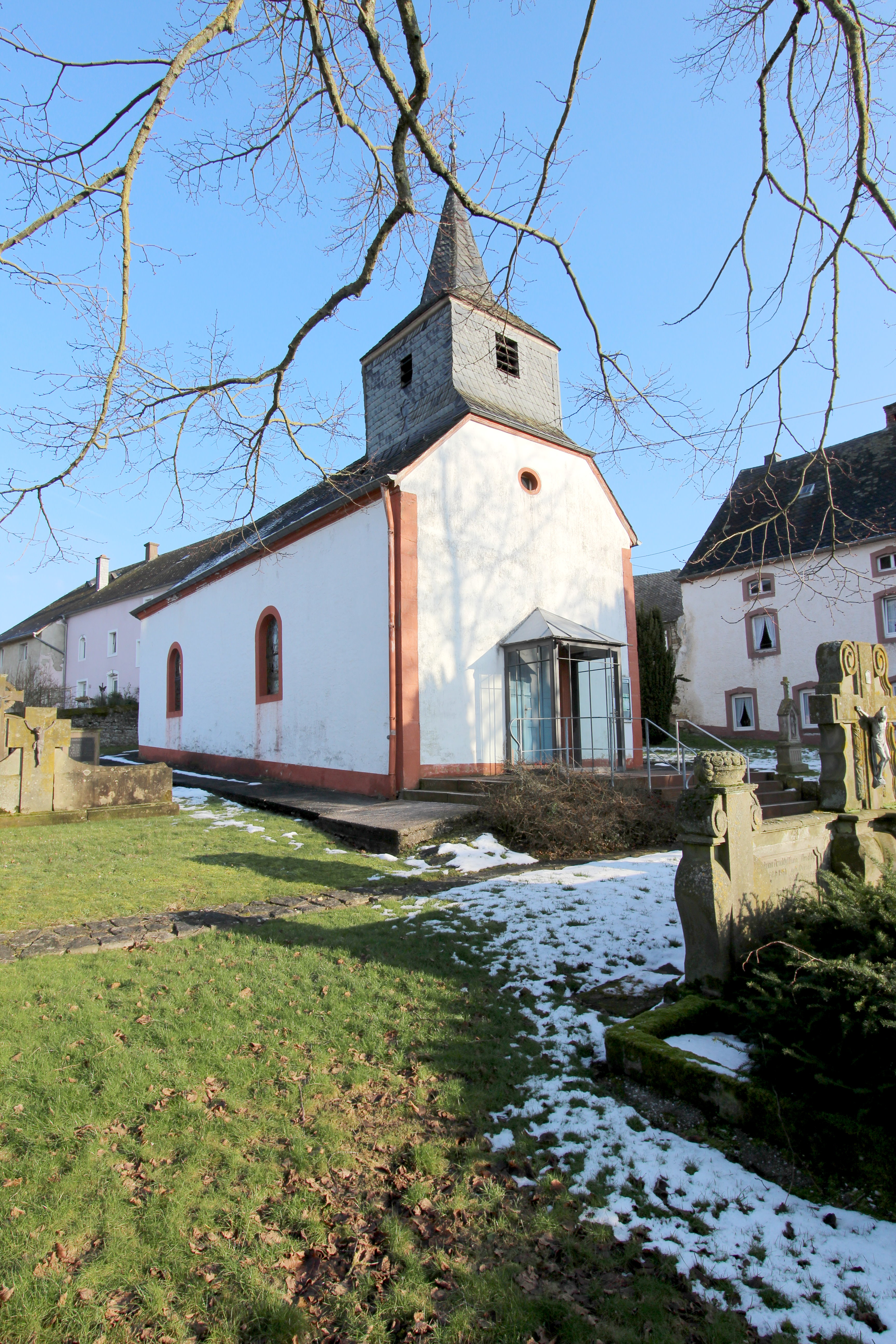 54634 Bitburg-Masholder, Zur Heide/Burengasse. Saalbau, bezeichnet 1808; mit Ausstattung; Kirchhof mit Familiengrabstätten, spätes 19. und erste Hälfte des 20. Jahrhunderts; späthistoristisches Grabmal Familie T. Neyses; in der vorgelagerten Treppe Kapitell, 18. Jahrhundert, und Ecce-Homo-Büste. Aufnahme von 2018.